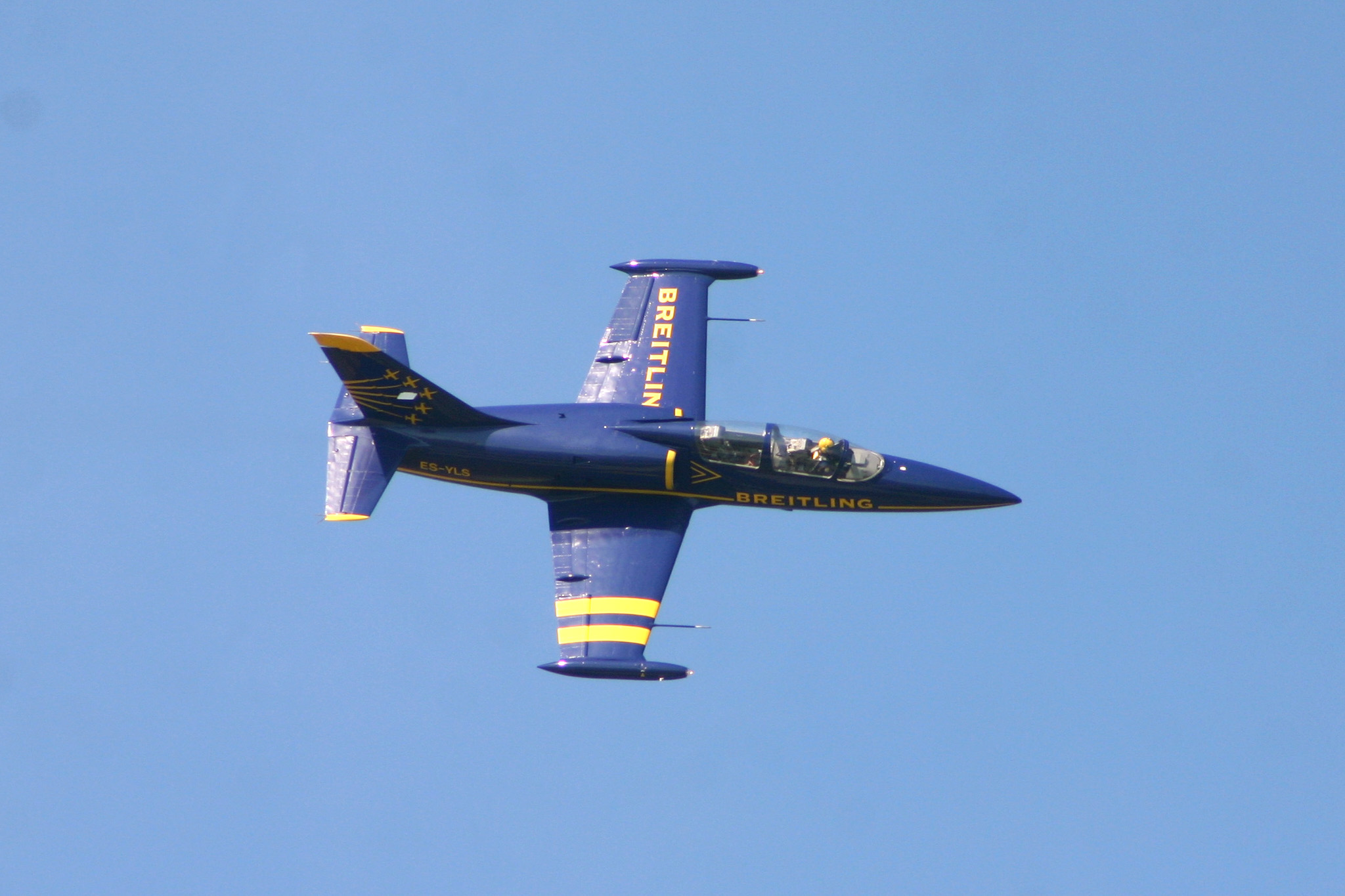 Breitling Jet Team at Air 04, Payerne, Switzerland